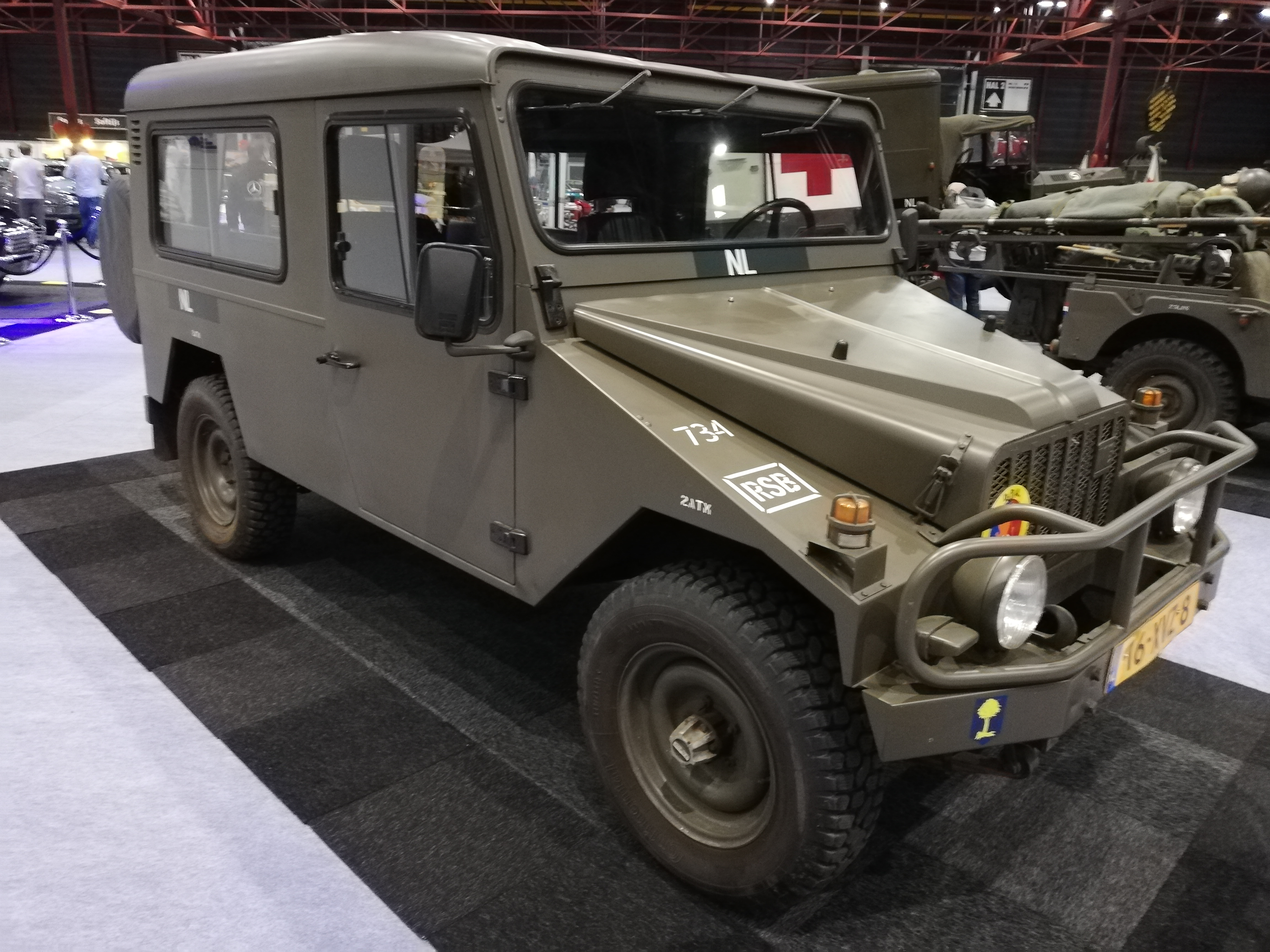 UMM Entrepreneur 2.3 Hardtop (1985) bij CLASSICSNL 2018 in Leeuwarden. In gebruik geweest bij de Rijschool Bergen op Zoom (RSB) van de Koninklijke Landmacht.